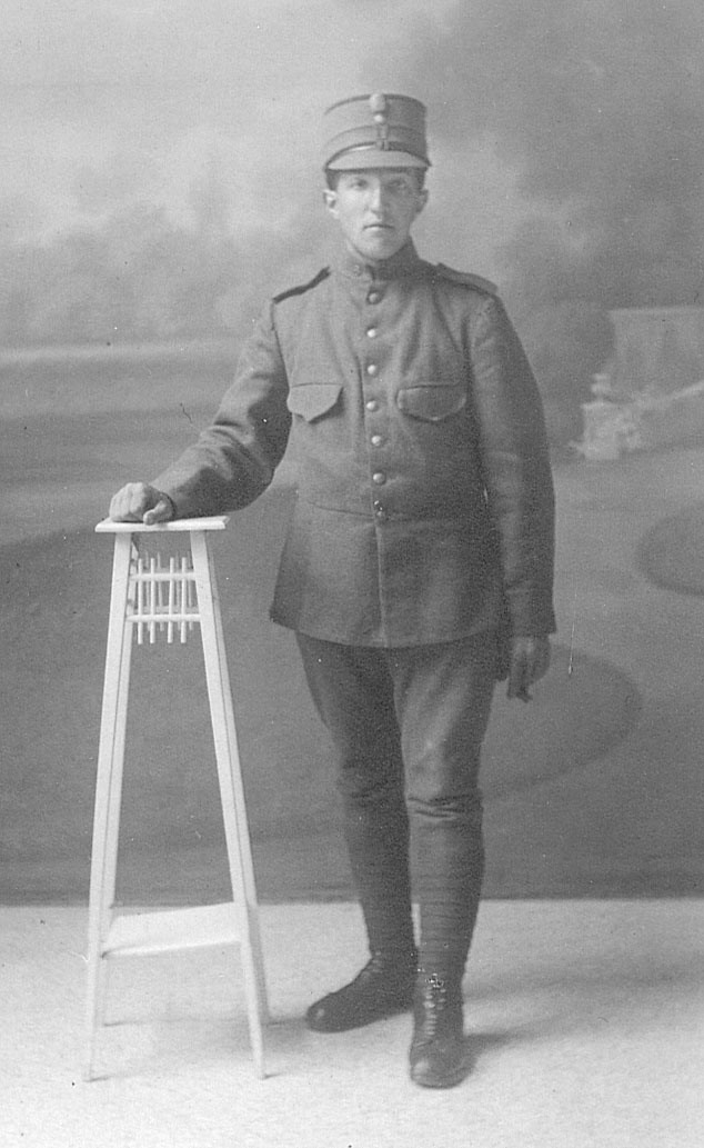 Gerard Beuvink als Soldaat